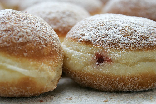 Konditorei Buchmann: frische Berliner